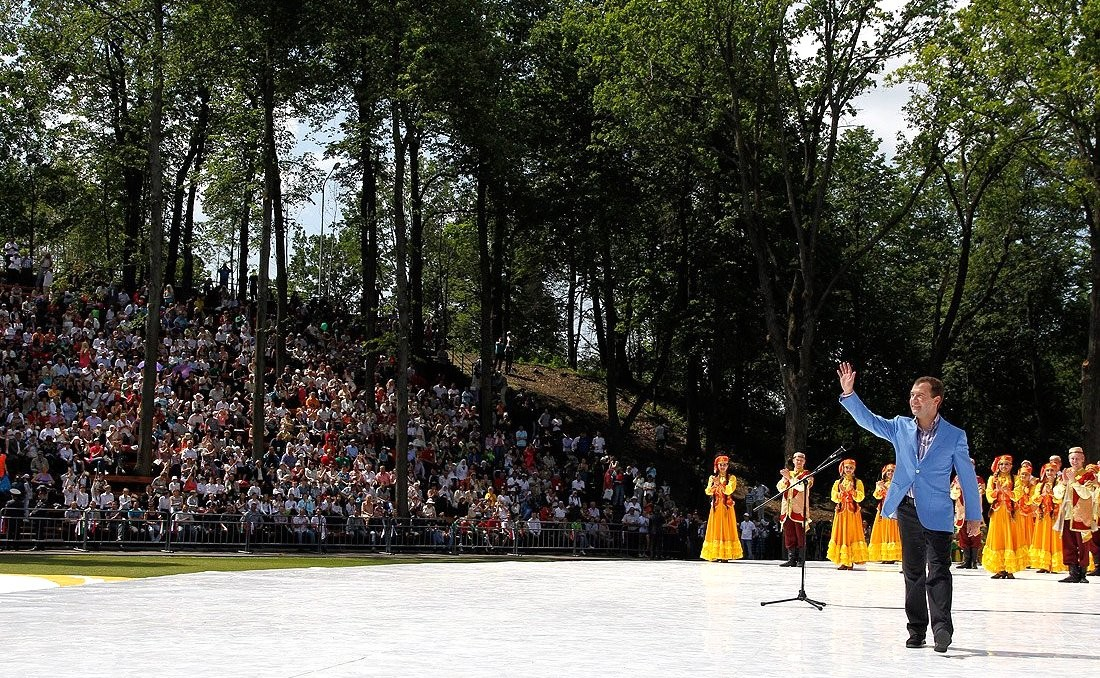 Поздравление с национальным праздником Сабантуй.